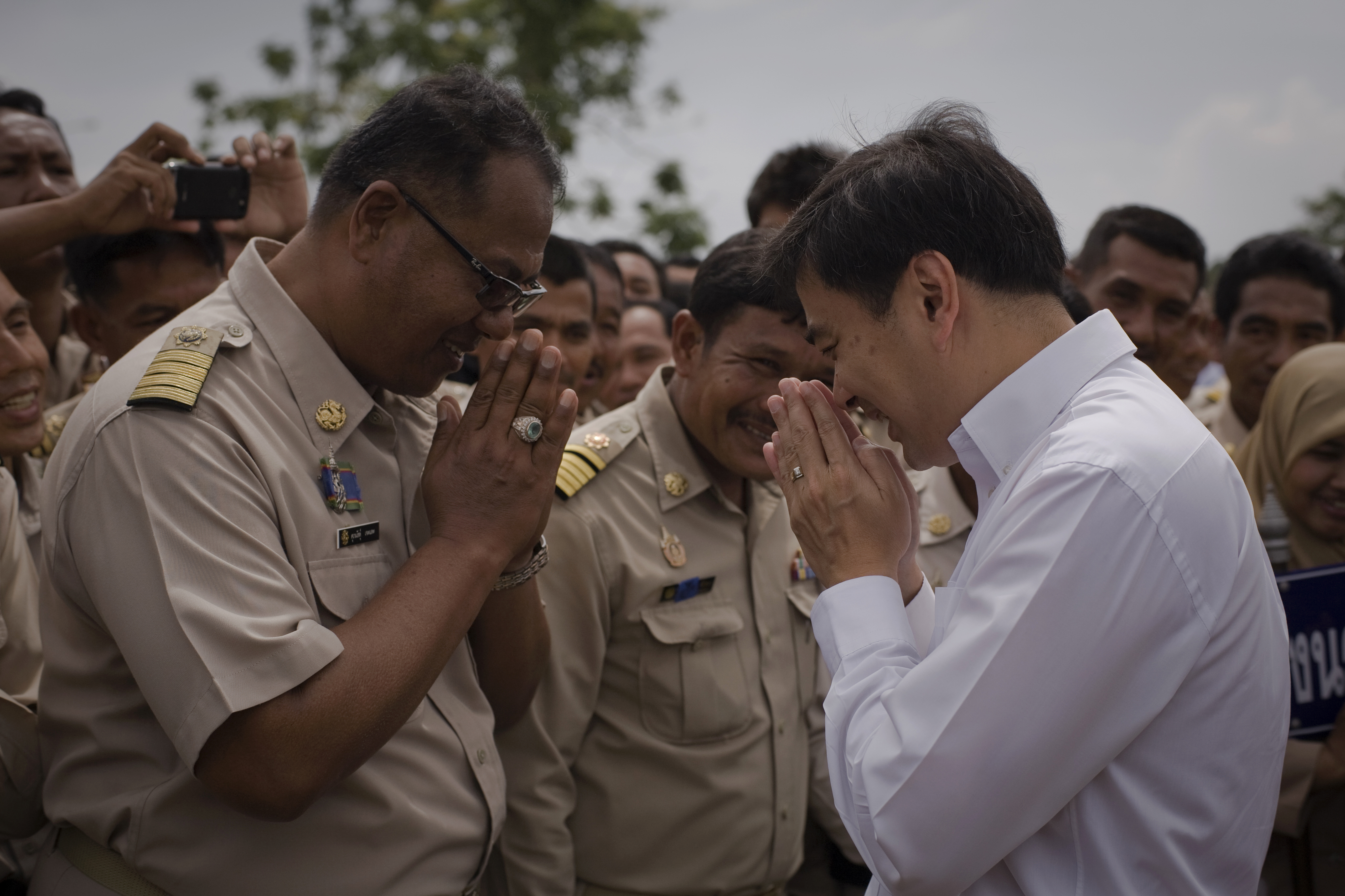 นายกรัฐมนตรี ประชุมคณะกรรมการยุทธศาสตร์ด้านการพัฒนาจังหวัดชายแดนภาคใต้ (กพต.) ณ ห้องประชุมพระนราภิบาล ชั้น 5 ศาลากลางจังหวัดนราธิวาส วันเสาร์ ที่ 30 เมษายน พ.ศ.2554 (Photographer attached to the Prime Minister of the Kingdom of Thailand (H.E.Mr.Abhisit Vejjajiva) : Peerapat Wimolrungkarat / พีรพัฒน์ วิมลรังครัตน์) @is50mm